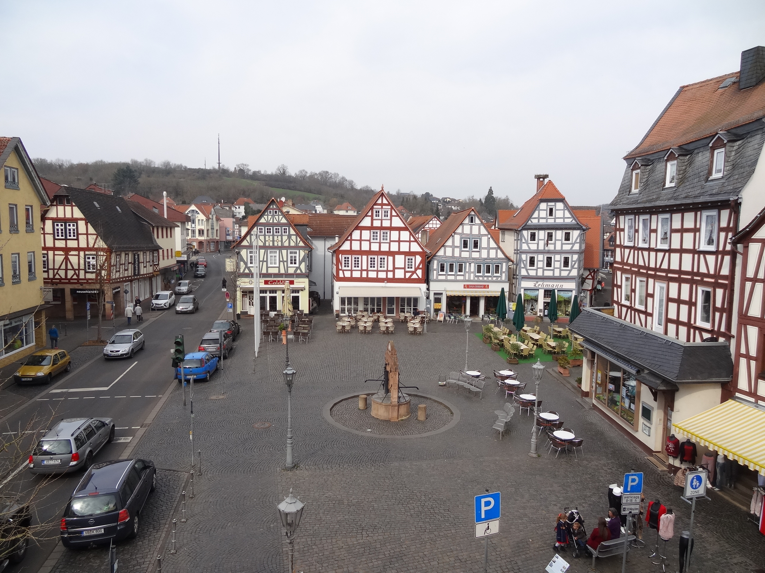 Gesamtanlage Altstadt (Nidda)